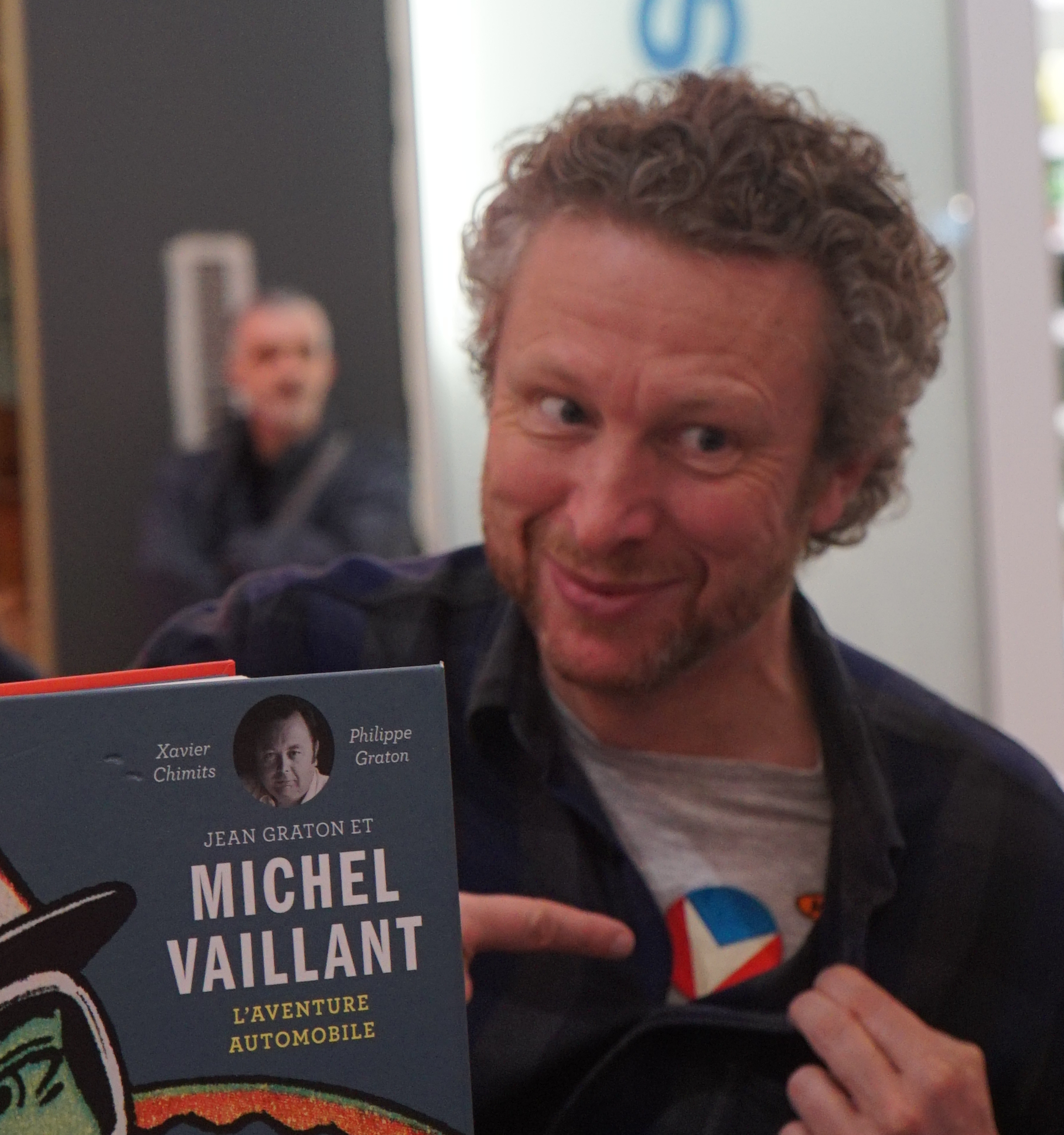 scéance de dédicace de leurs oeuvres.